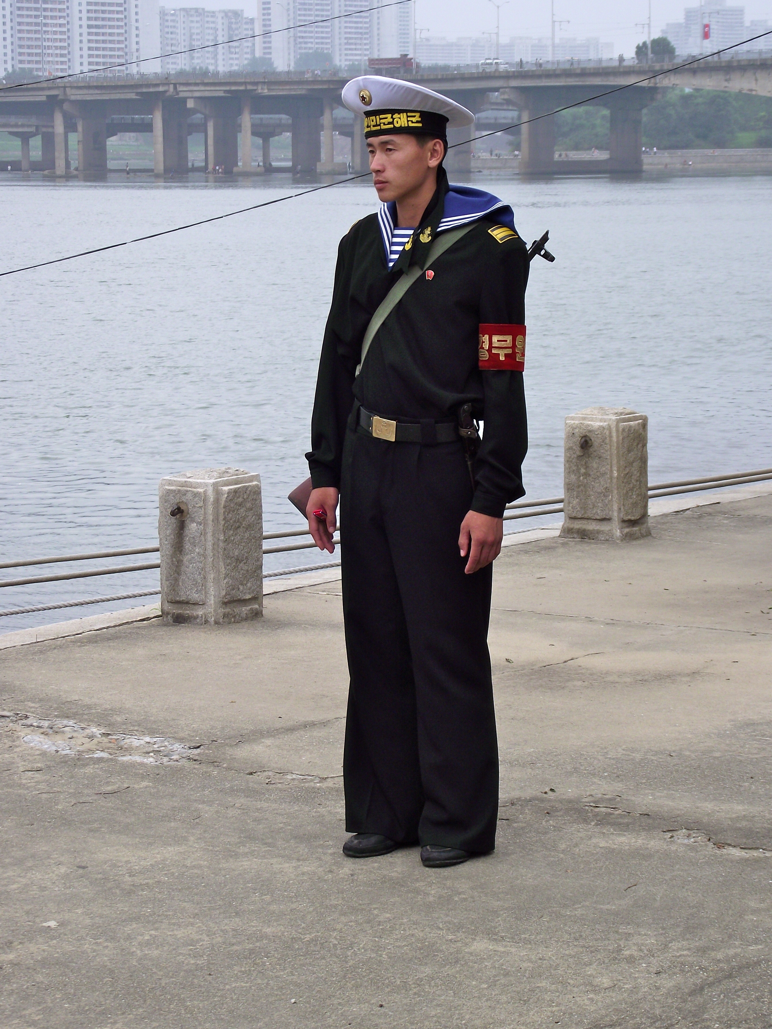 USS Pueblo in custody in Pyongyang